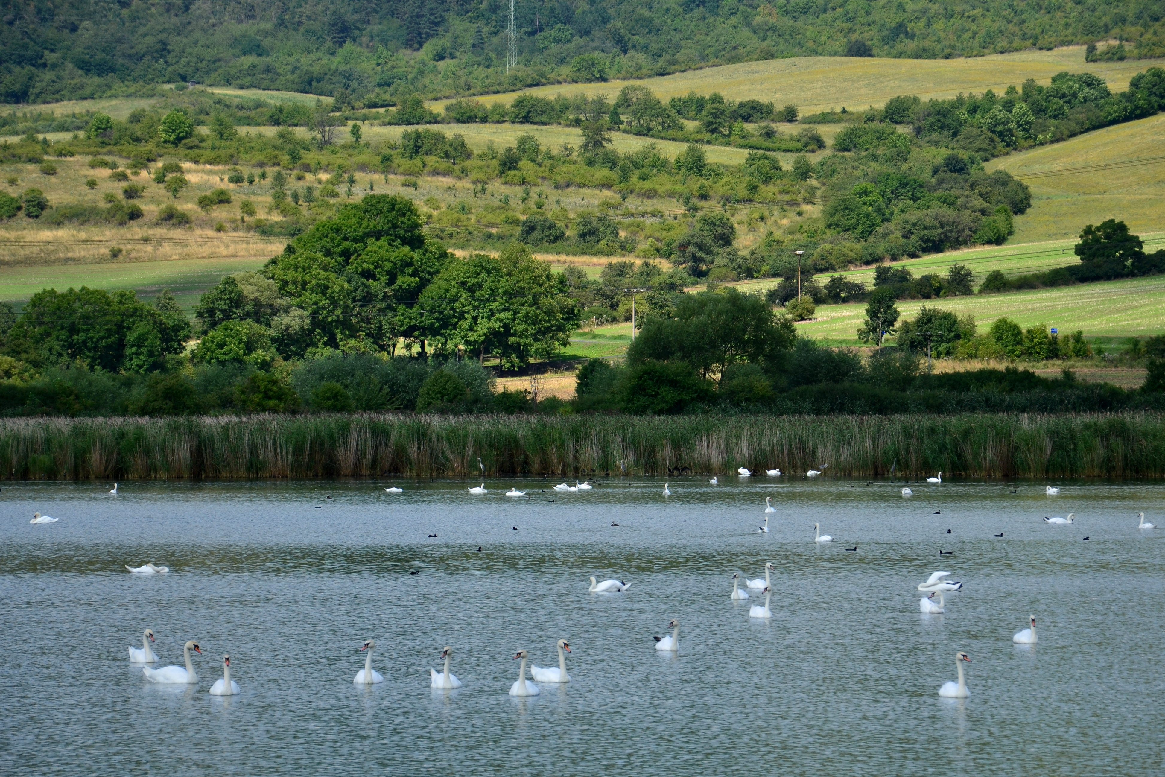 Labutě na Vinařském rybníce